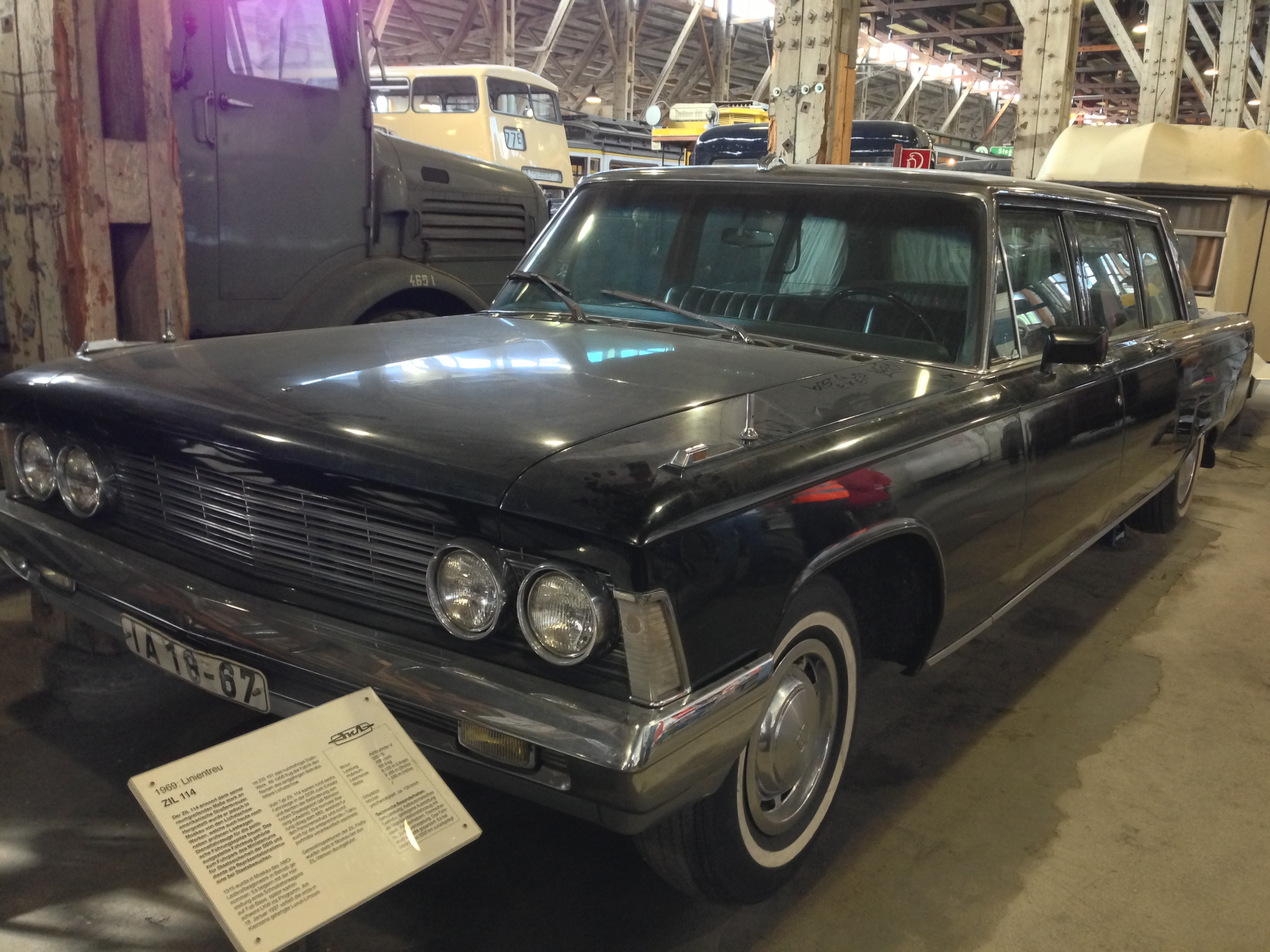 Depot des Deutschen Technikmuseums Berlin